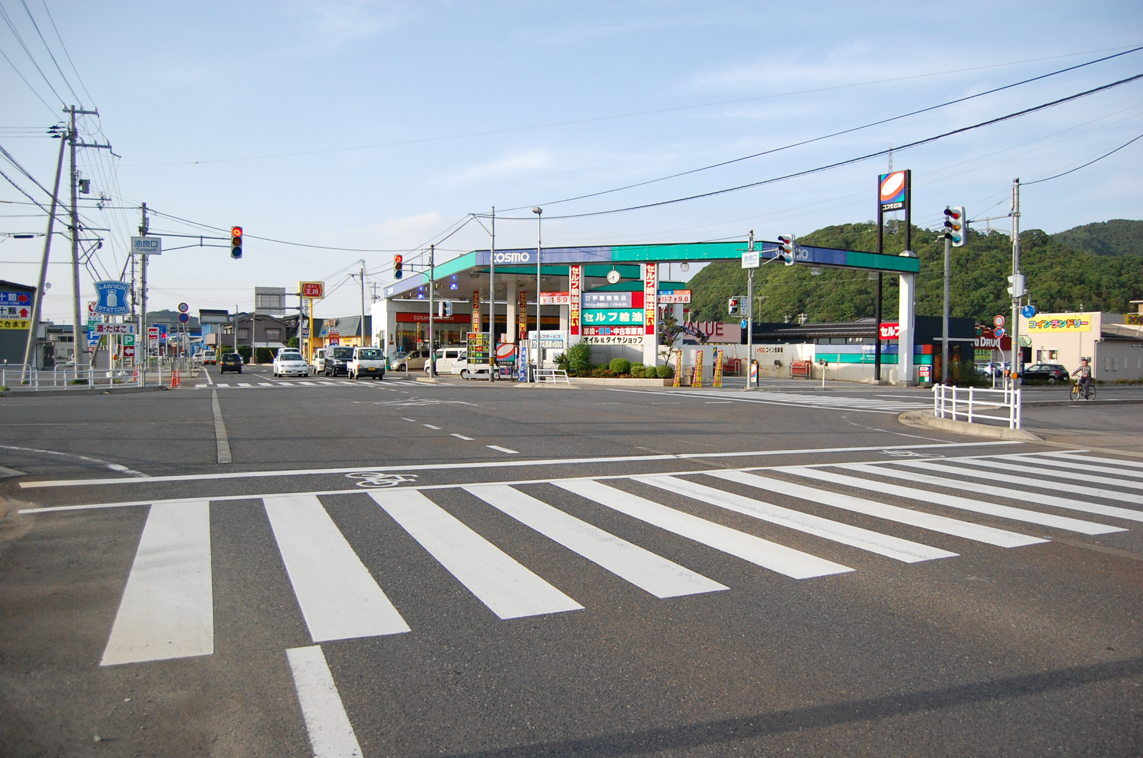 兵庫県香美町香住区香住、油良口交差点。県道4号（旧国道178号）および県道11号（起点）の交点。山陰近畿道（国道178号）香住インターチェンジ出口とも接続。